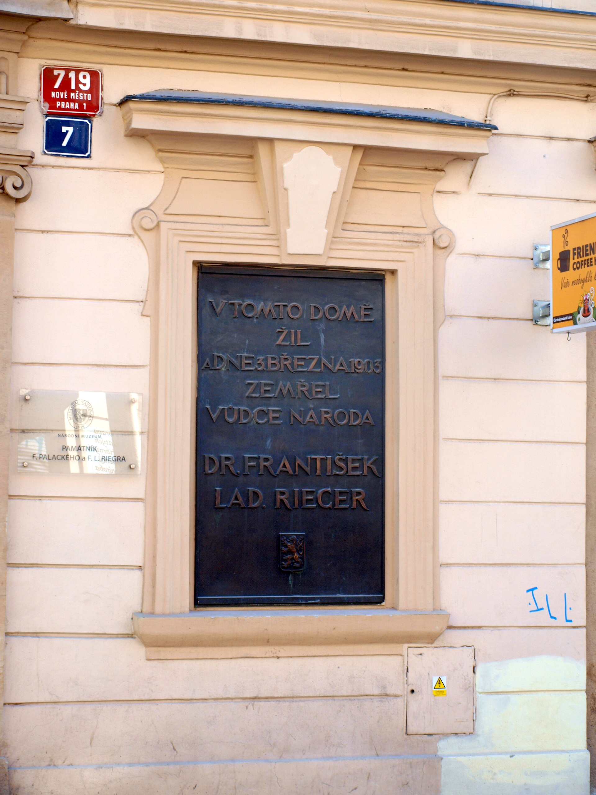 MacNevenův palác - pamětní deska Rieger